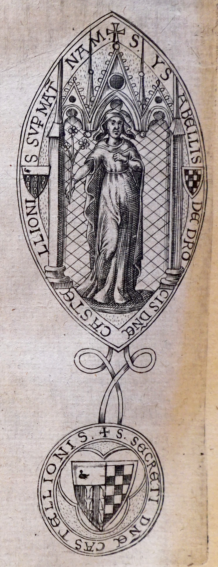 reproduction du sceau d'ISabeau de Dreux épouse de Gaucher de Chatillon .